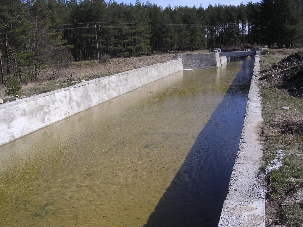 Jägala-Joa